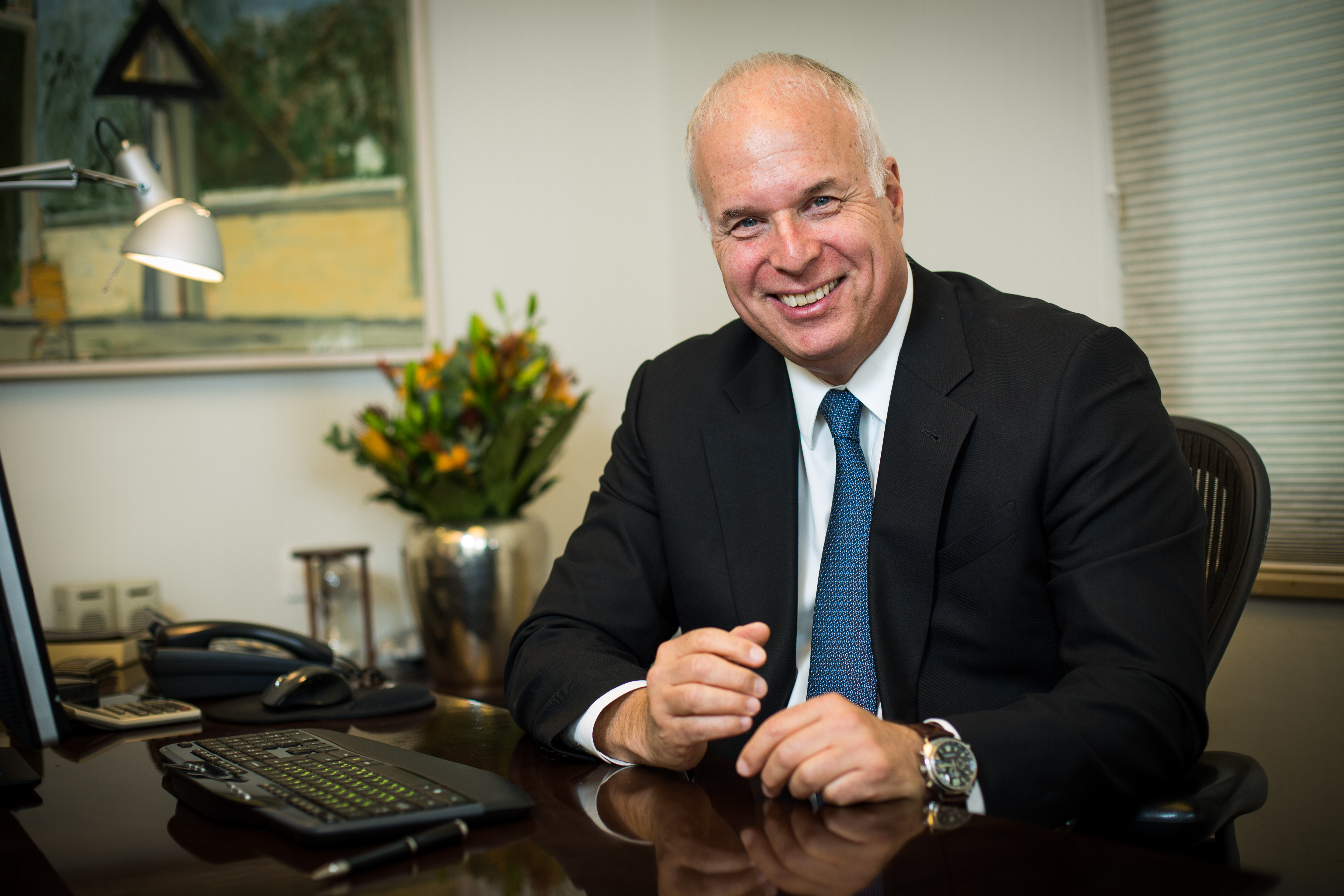 תמונה של אלקס הרטמן